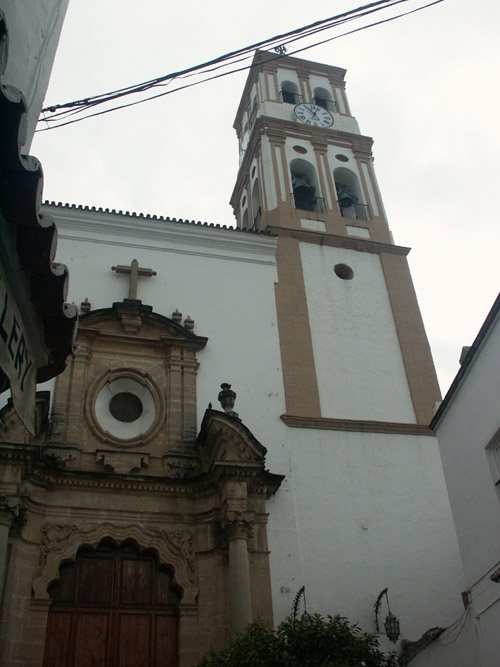 Marbella, Oude stad, Iglesia de la Encarnacion.